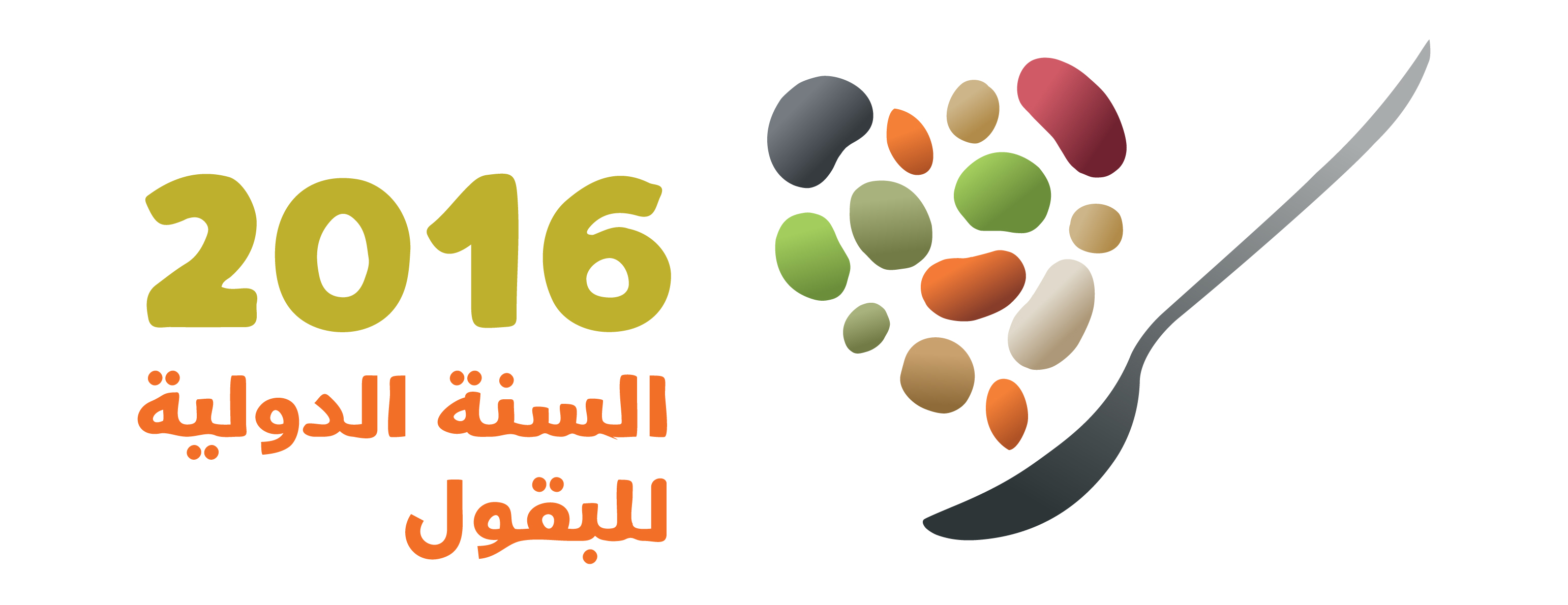 شعار السنة الدولية للبقول 2016